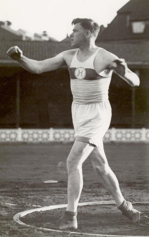 Discus thrower Ketil Askildt at Bislett in Oslo, Norway